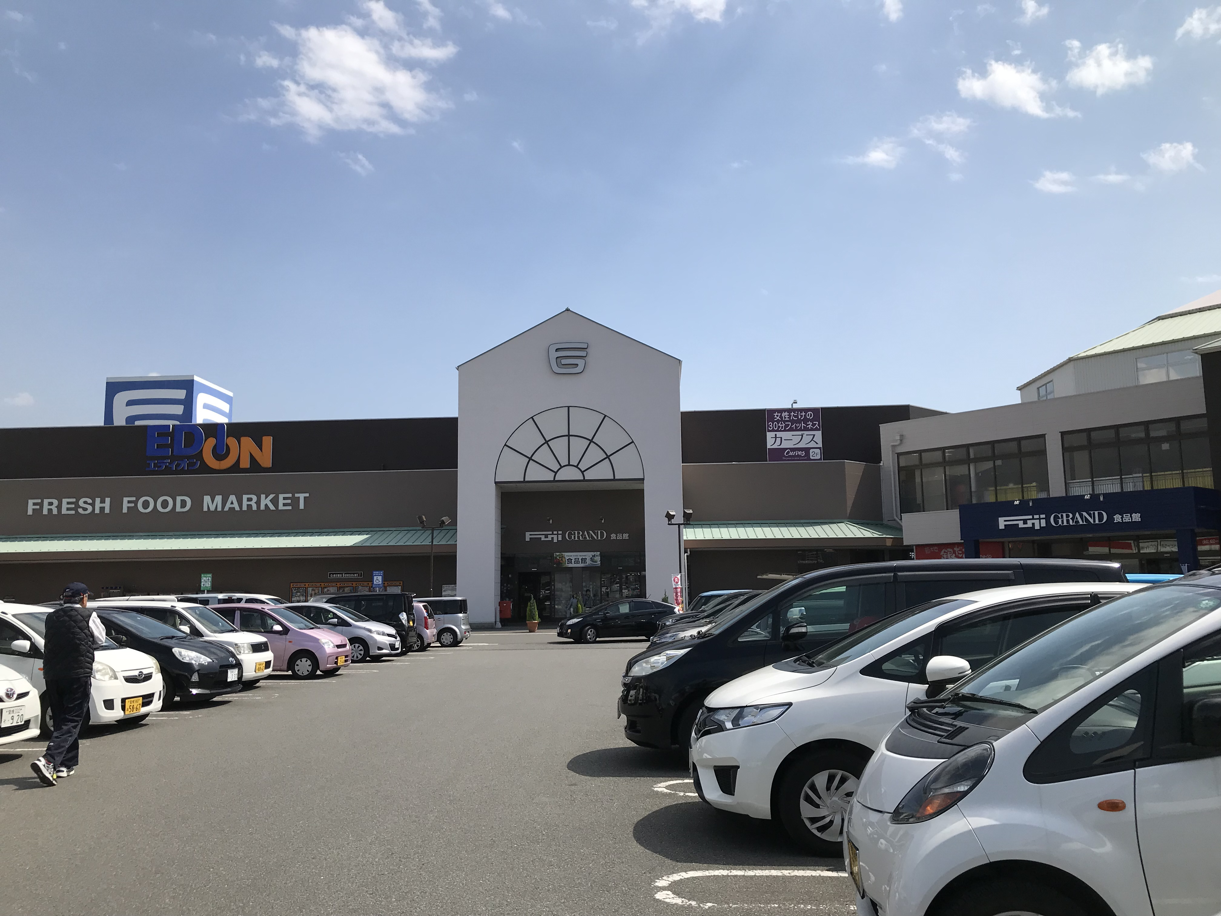 2018年5月のフジグラン重信 東館です。